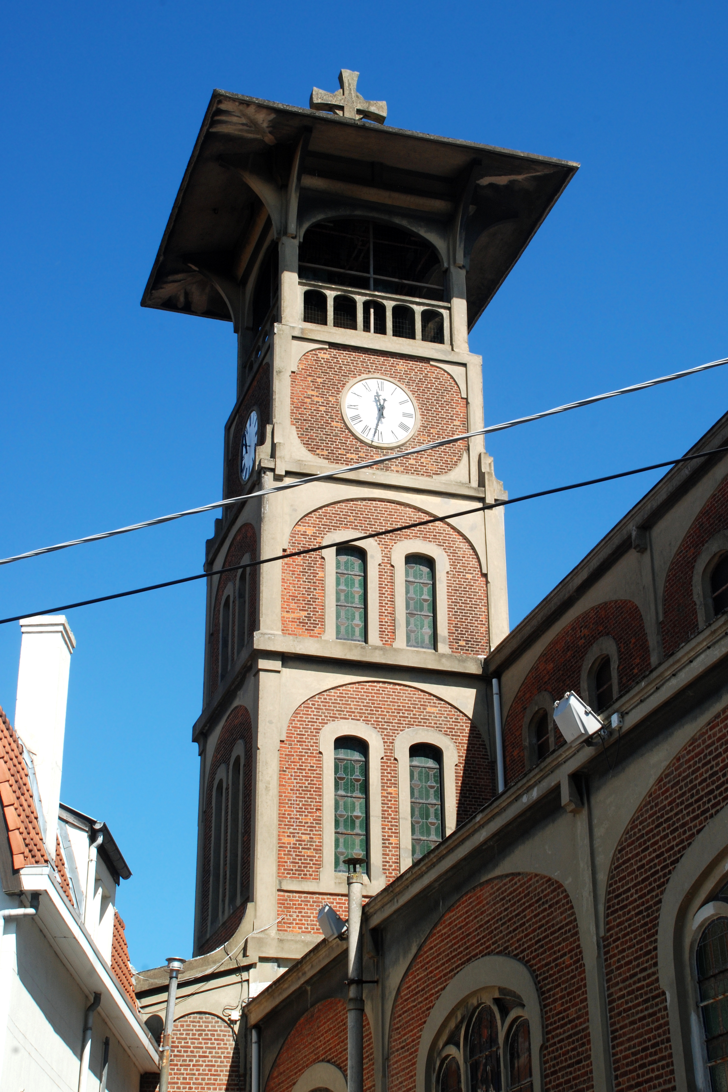 Belgique - Brabant wallon - Rixensart - Genval - Église Saint-Pierre de Maubroux